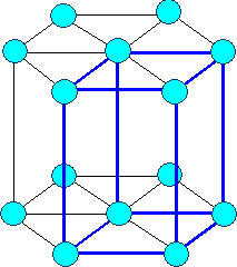 Hexagonálna základna mriežka.